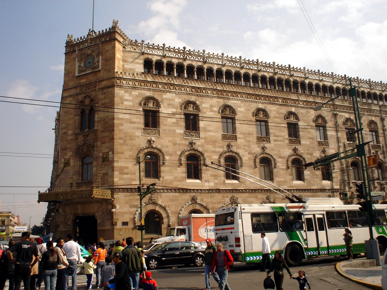 PALACIO POSTAL